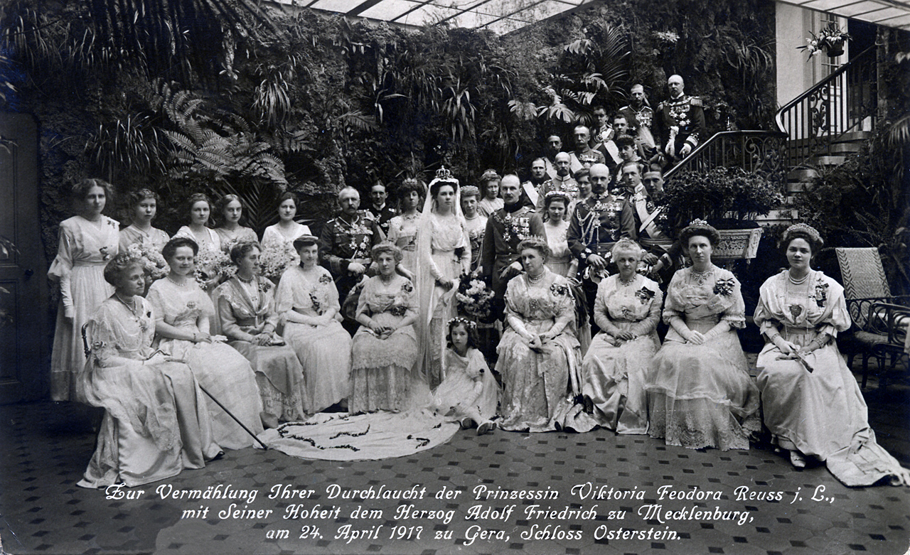 Postkarte zur Hochzeit von Prinzessin Viktoria Feodora Reuss jüngere Linie mit dem Herzog Adolf Friedrich zu Mecklenburg, Gera, Schloss Osterstein, 24. April 1917